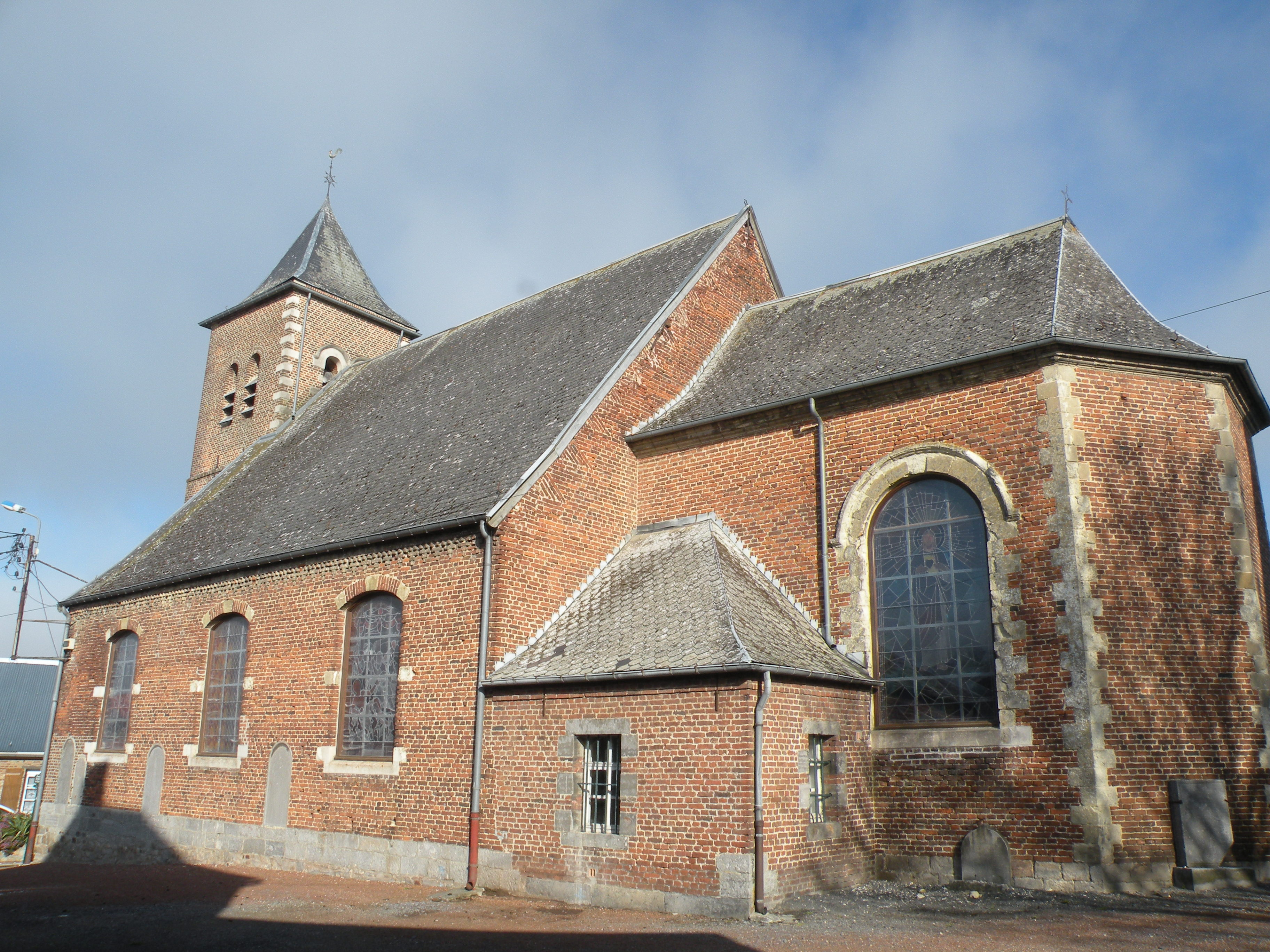 église de Bry (Nord)